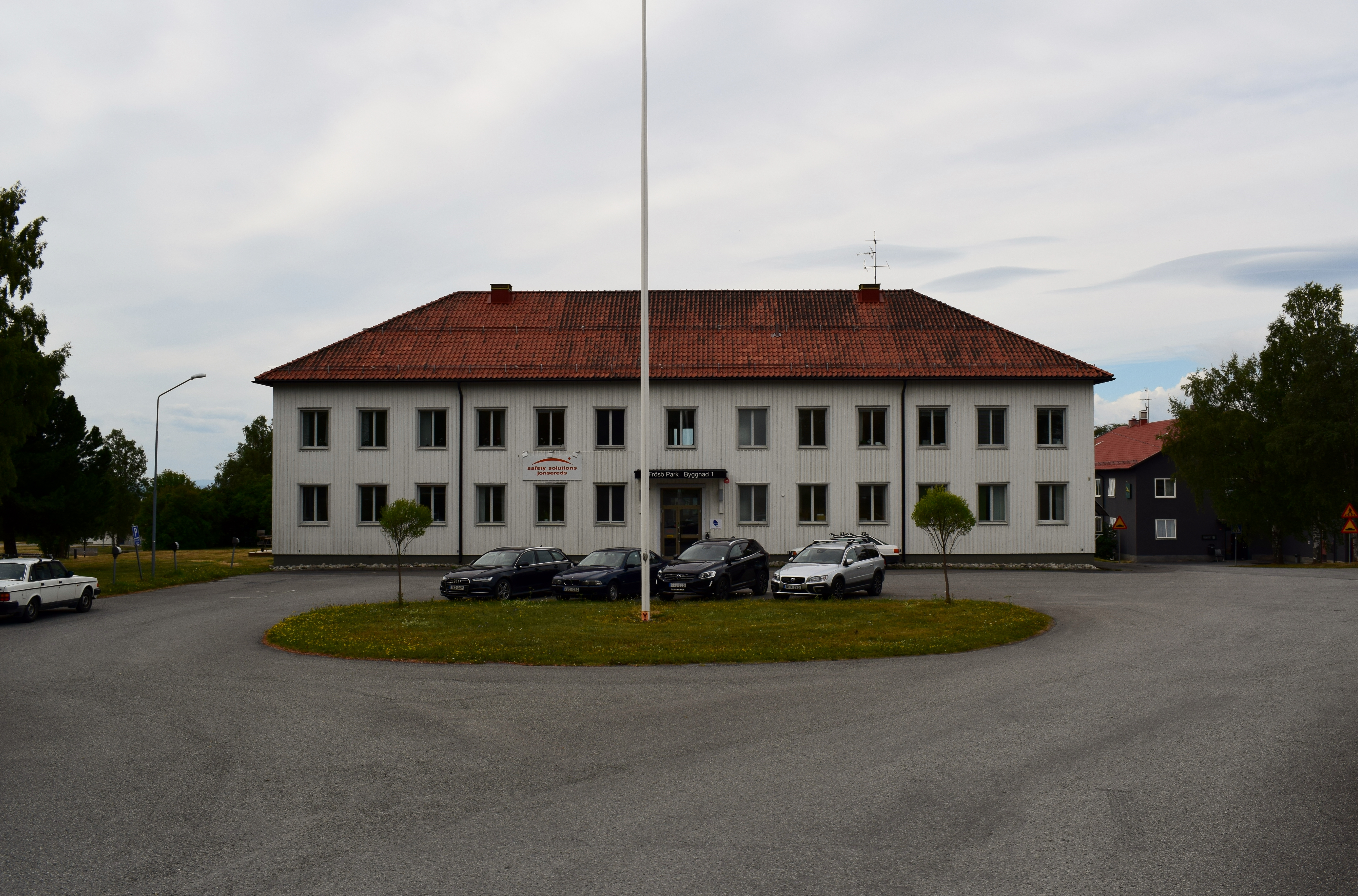 Före detta kanslihus vid Jämtlands flygflottilj.